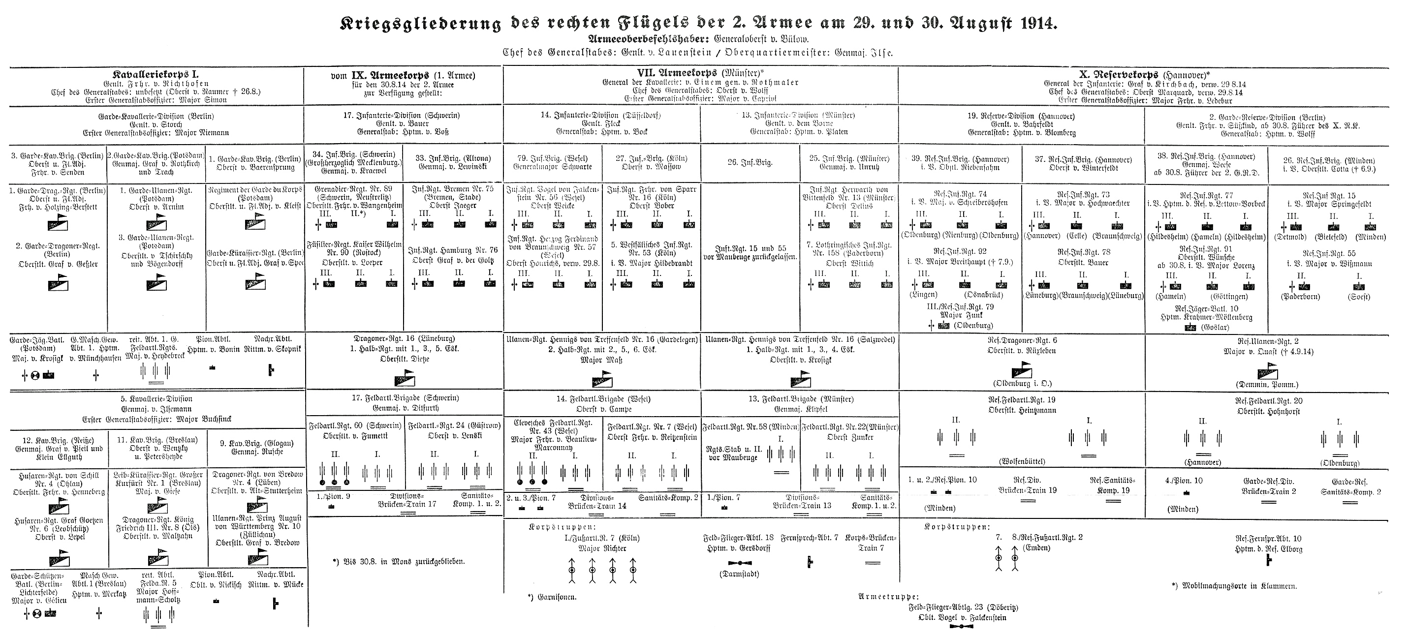 Der rechte Flügel der deutschen 2. Armee am 29. und 30. August. Grenadier-Regiment Nr. 89 Unterstellung 2. Armee.